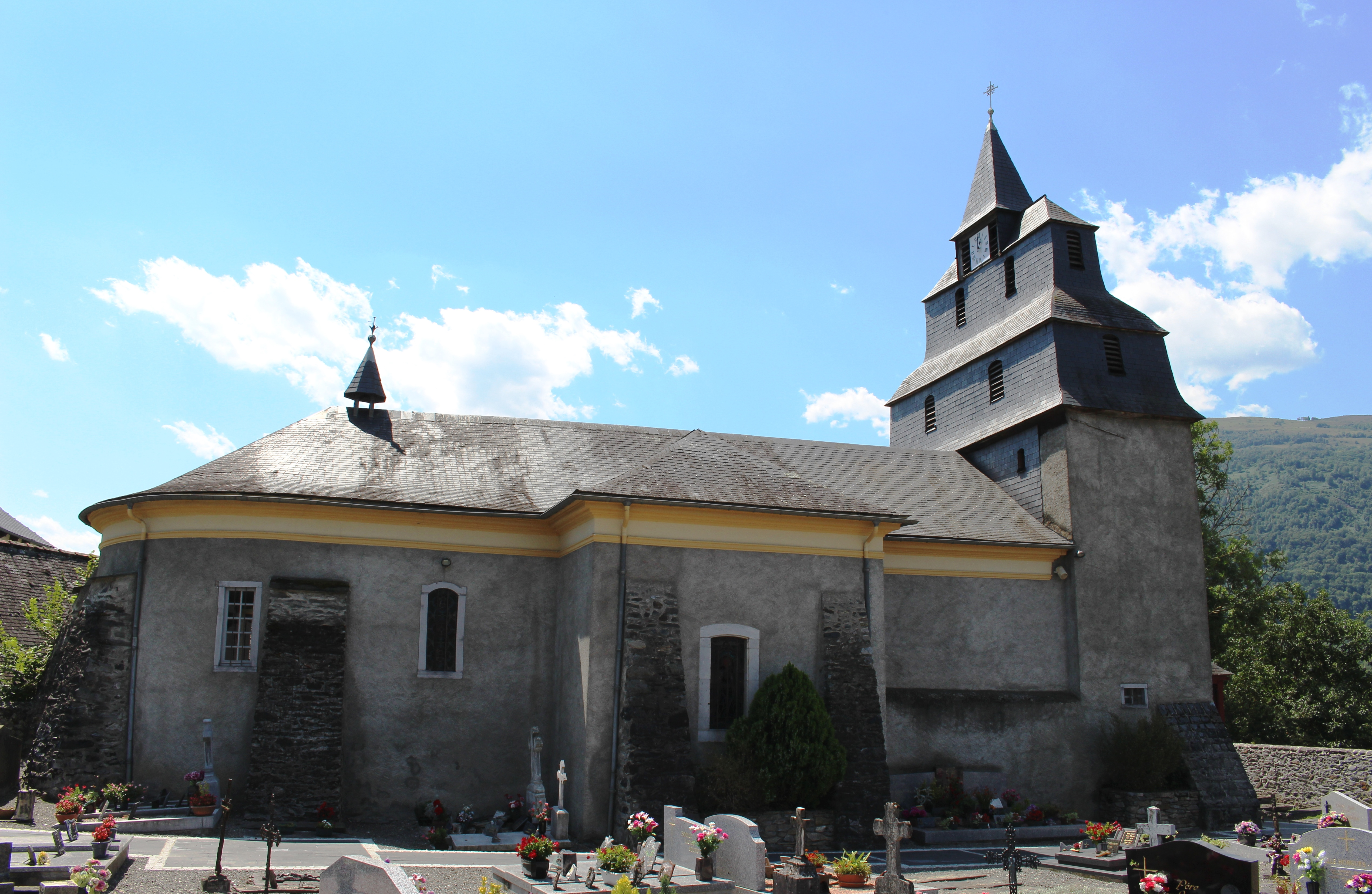 Église Saint-Sernin de Préchac (Hautes-Pyrénées)